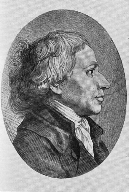 Johann Georg Schlosser (1739 bis 1799). Kolorierter Kupferstich von Prestel nach Ph.J.Becker. Sammlung Kippenberg Leipzig.